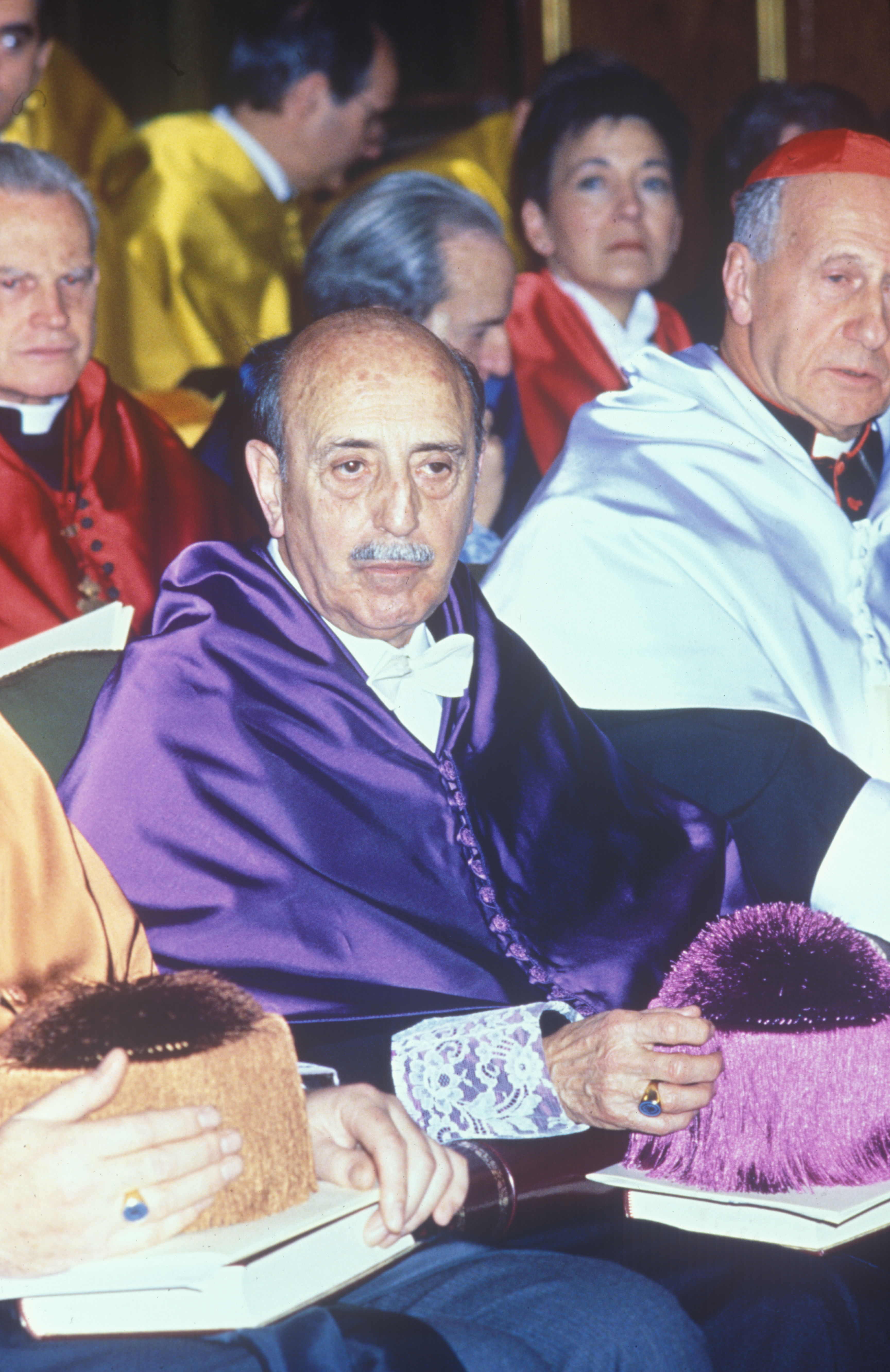 bioquímico y catedrático español, que tuvo un papel importante en la expansión de la Bioquímica en España